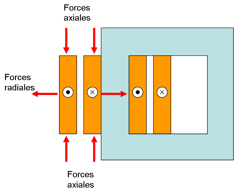 Représentation des forces magnétiques s'exerçant sur les enroulements d'un transformateur